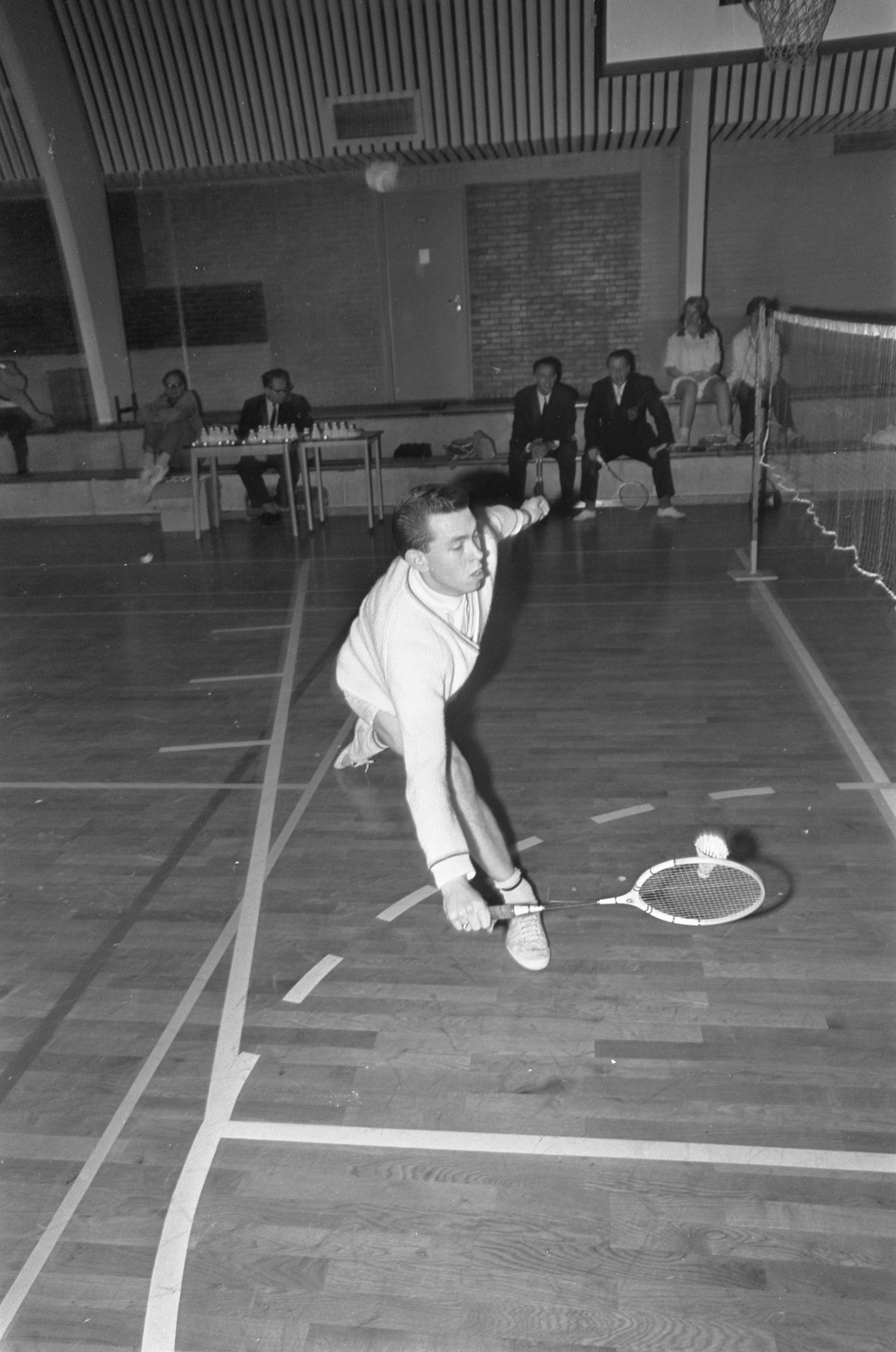 Collectie / Archief : Fotocollectie Anefo Reportage / Serie : [ onbekend ] Beschrijving : Badminton, Huub van Ginniken in aktie Datum : 15 april 1967 Trefwoorden : BADMINTON Fotograaf : Nijs, Jac. de / Anefo Auteursrechthebbende : Nationaal Archief Materiaalsoort : Negatief (zwart/wit) Nummer archiefinventaris : bekijk toegang 2.24.01.05 Bestanddeelnummer : 920-2339